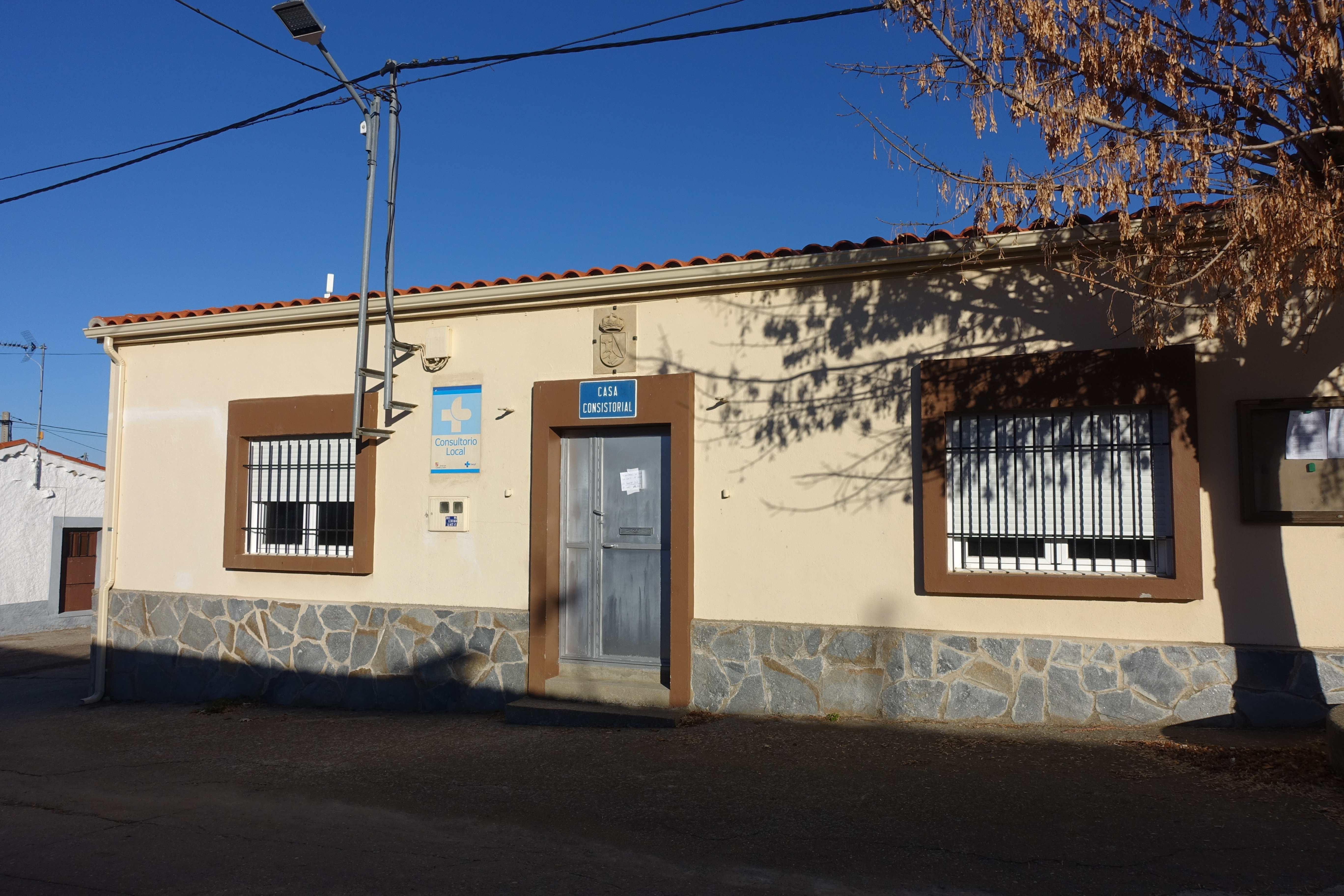 Casa consistorial de Sanchón de la Sagrada (Salamanca, España).